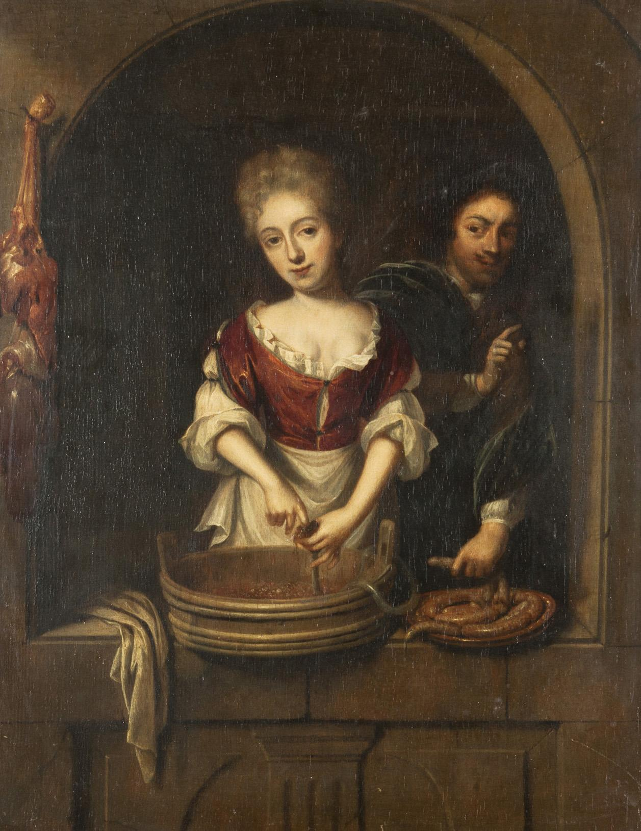 Stopfen der Würste. unsigniert, Öl/Holz, 47,5 x 37 cm